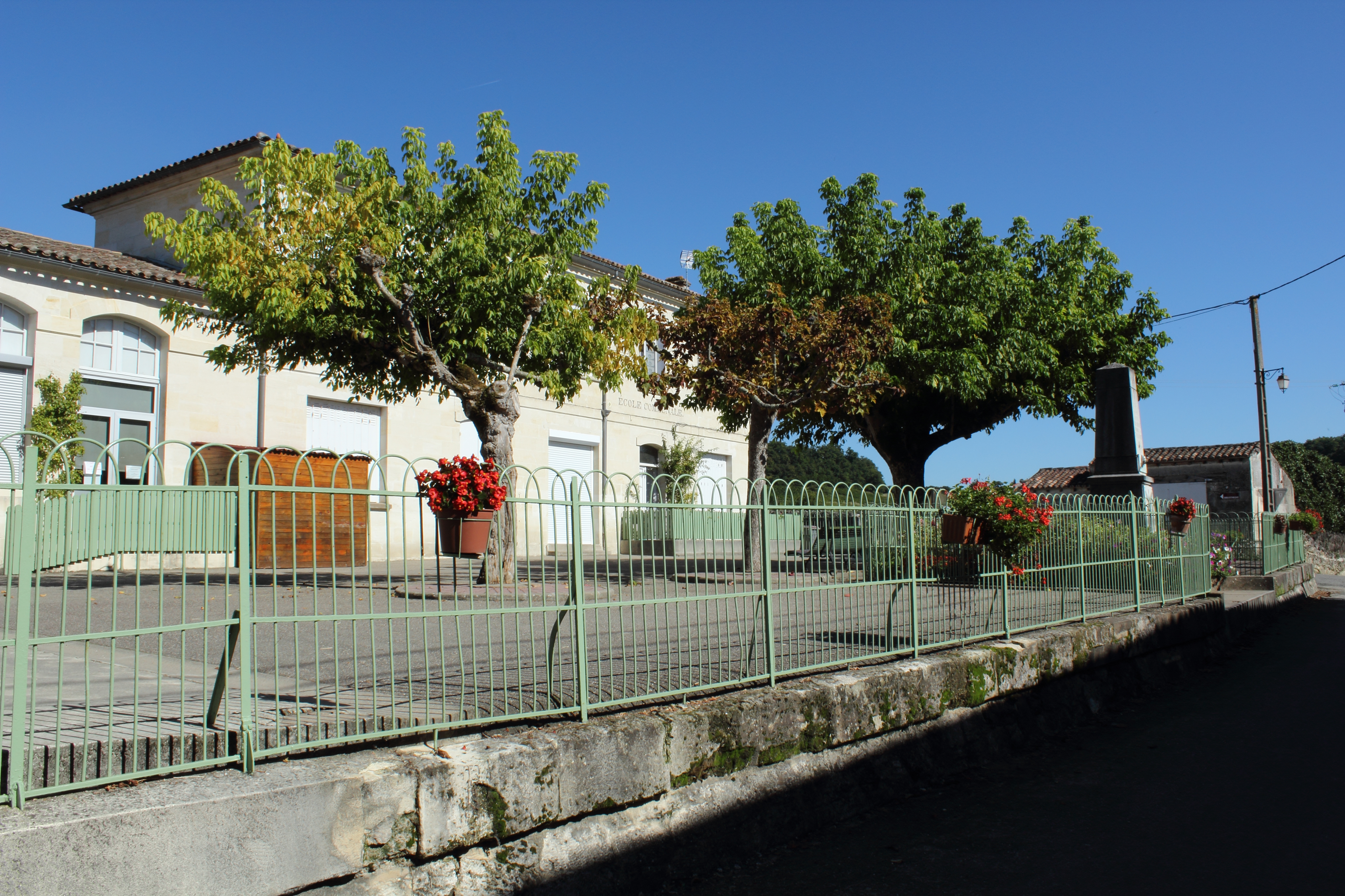 Vue de l'école de Saint-Michel de Fronsac